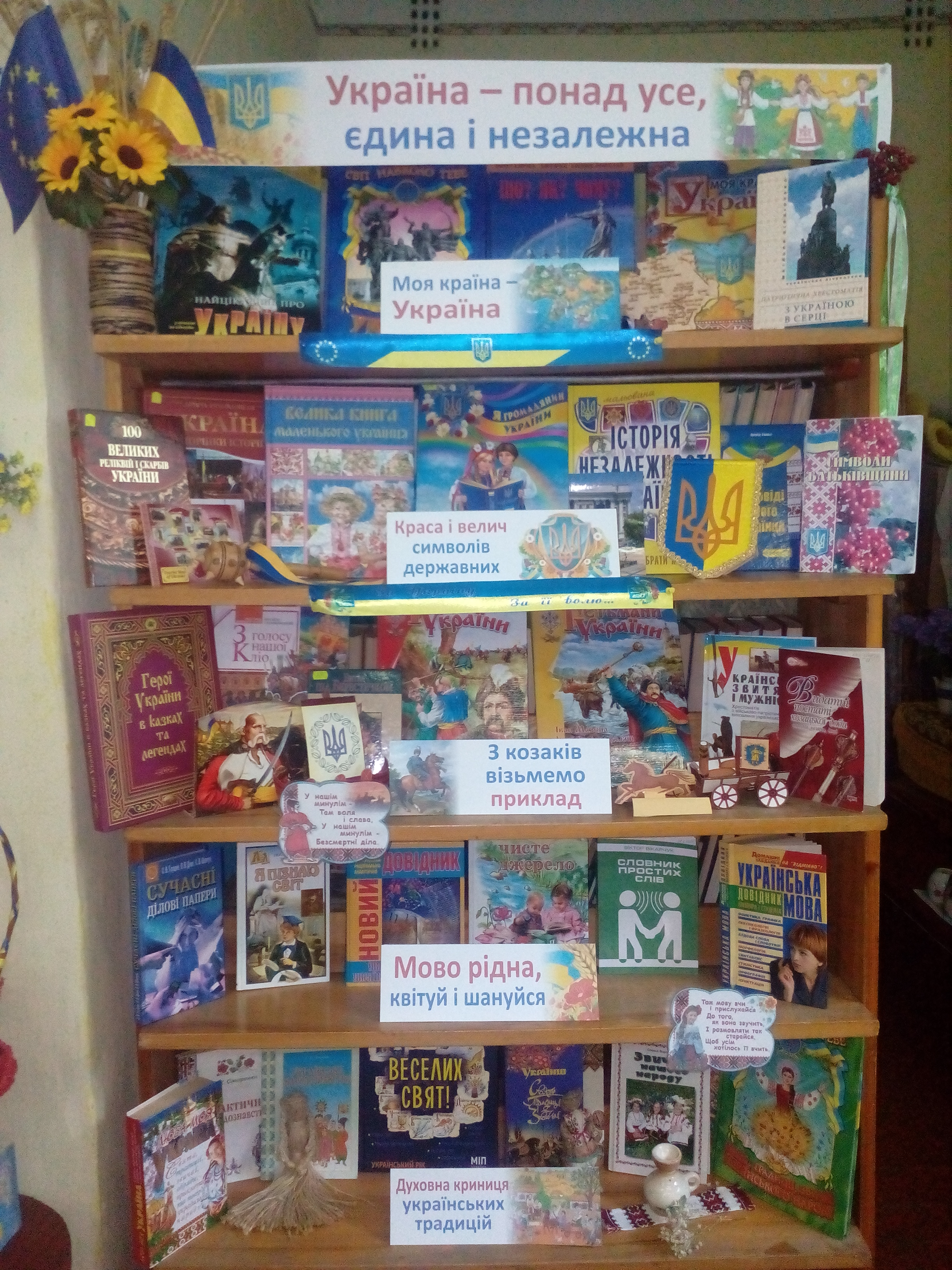 Постійно діюча книжкова виставка на патріотичну тему в читальному залі бібліотеки-філії №14 Хмельницької міської ЦБС 2019 рік.